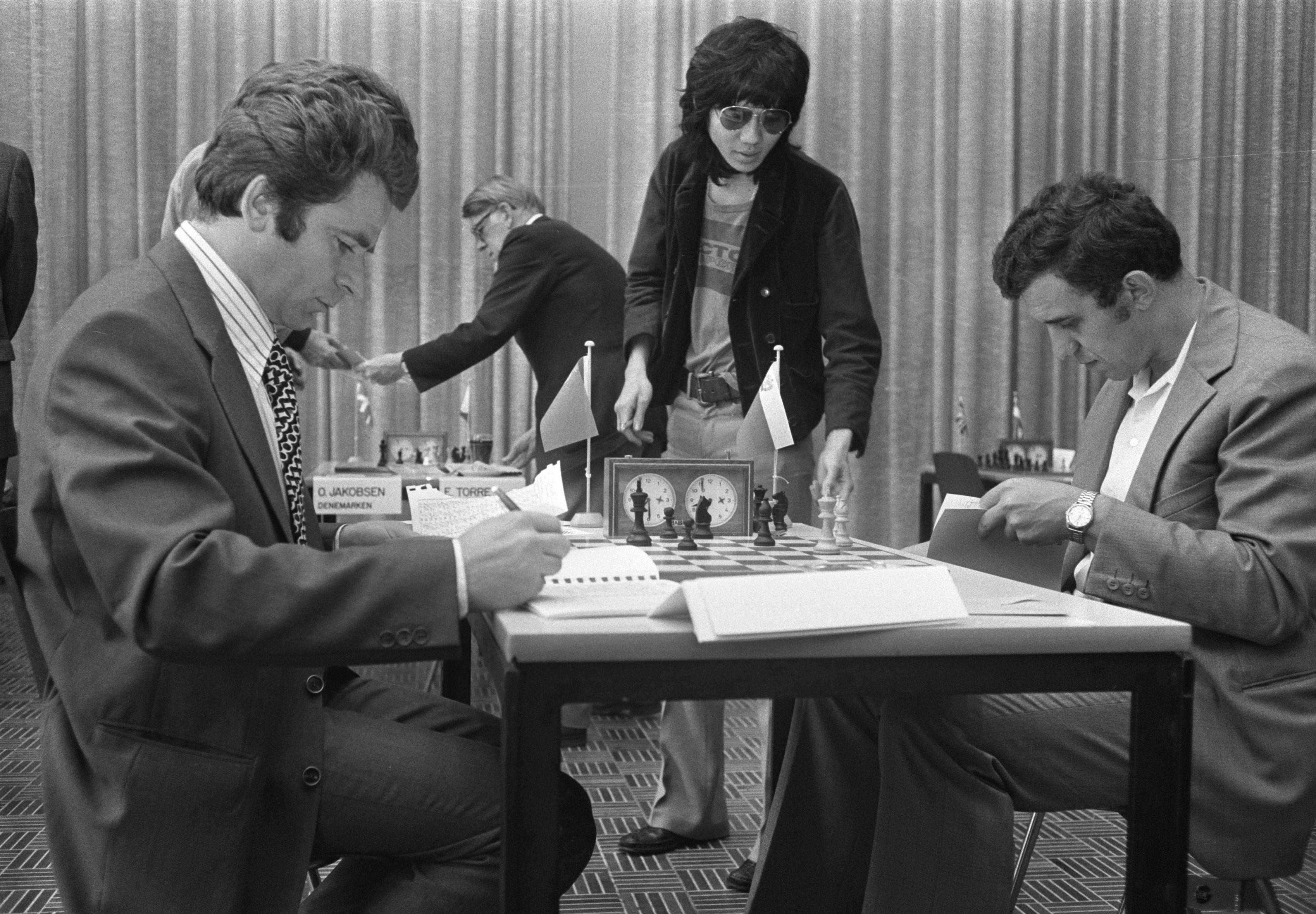 Collectie / Archief : Fotocollectie Anefo Reportage / Serie : [ onbekend ] Beschrijving : IBM-schaaktoernooi, afgebroken partij Spasski (links) tegen Radulov Datum : 26 juli 1973 Locatie : Amsterdam, Noord-Holland Trefwoorden : schaken Persoonsnaam : Radulov, Ivan, Spassky, Boris Fotograaf : Croes, Rob C. / Anefo Auteursrechthebbende : Nationaal Archief Materiaalsoort : Negatief (zwart/wit) Nummer archiefinventaris : bekijk toegang 2.24.01.05 Bestanddeelnummer : 926-5732